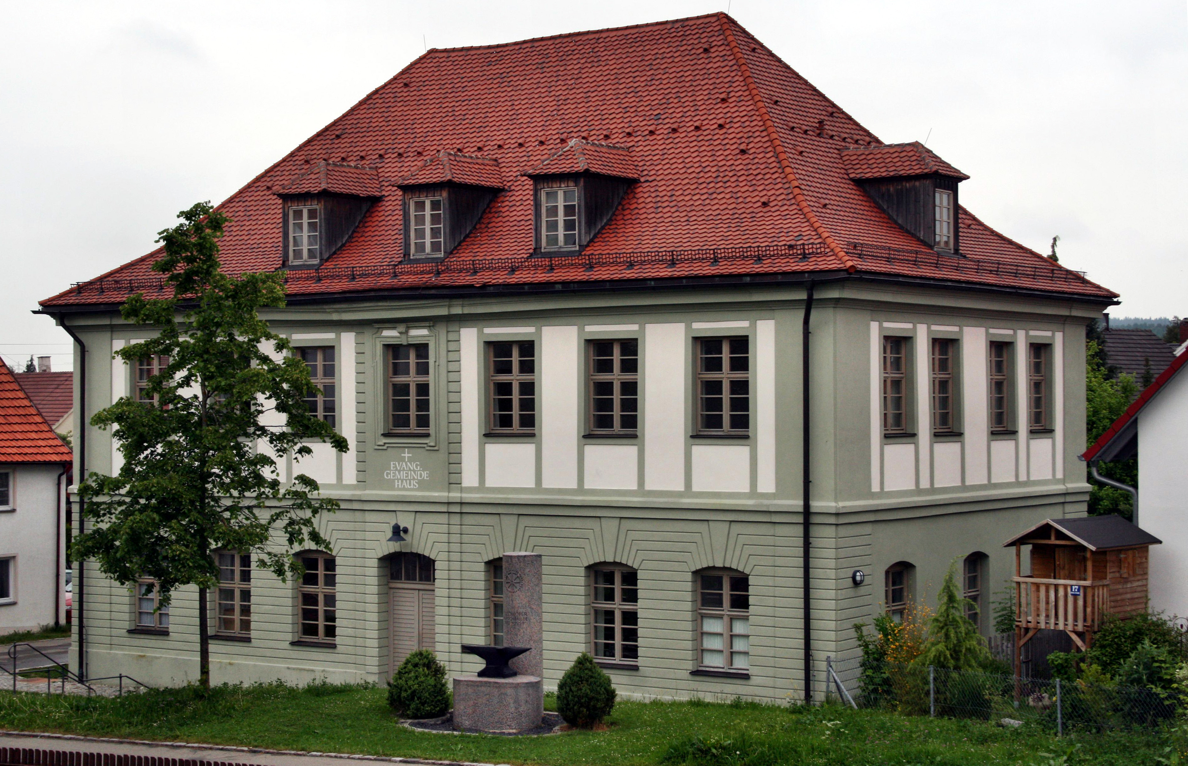 Das Amendinger Schlössle aus dem Jahre 1730. Es beherbergt nach wechselhafter Geschichte und nach Fertigstellung der Renovierung 1998 das evangelische Gemeindehaus Amendingen.